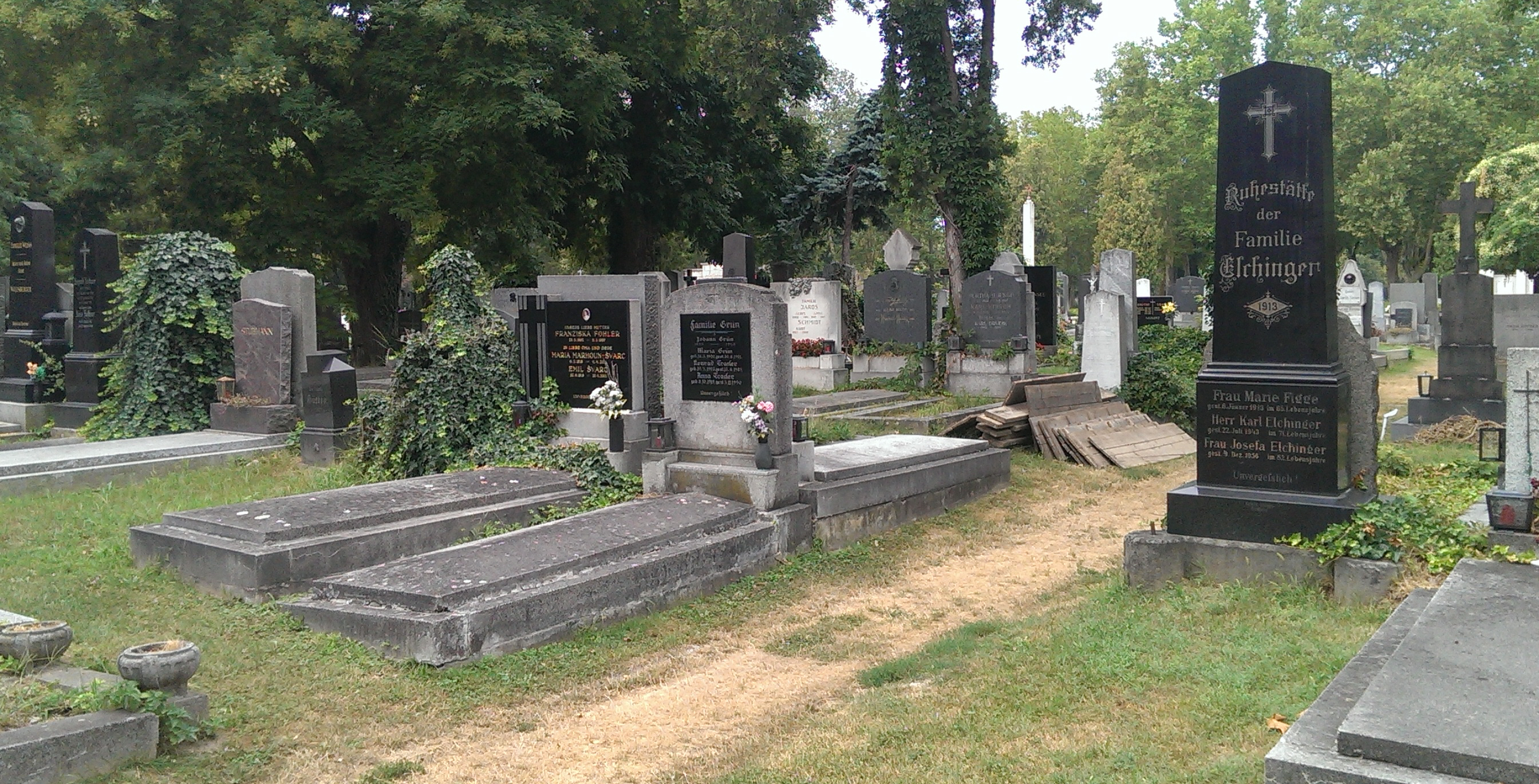 Auf dem Weg links vom Grab der Familie Elchinger wurde während der Dreharbeiten zum Film "Der dritte Mann" das Grab von Harry Lime auf dem Wiener Zentralfriedhof fingiert (Gruppe 43A, Reihe 14, Nummer 16)